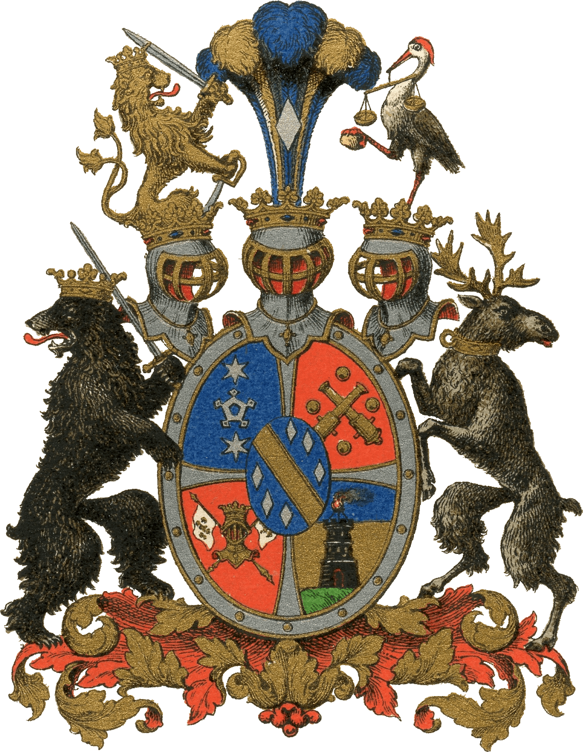 Vaakuna